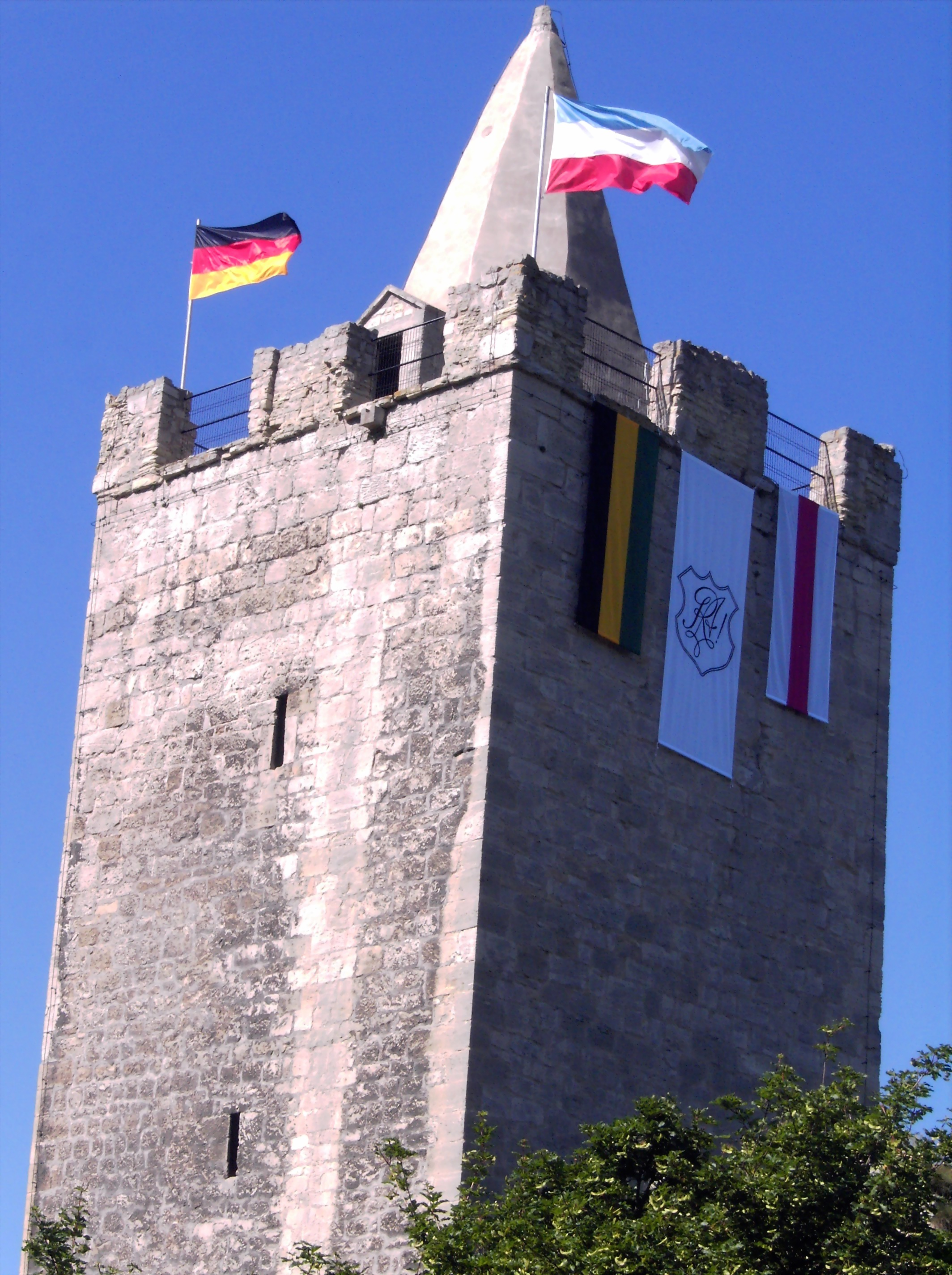 Turm der Rudelsburg mit Flaggen, mit Zirkel der Rudelsburger Allianz